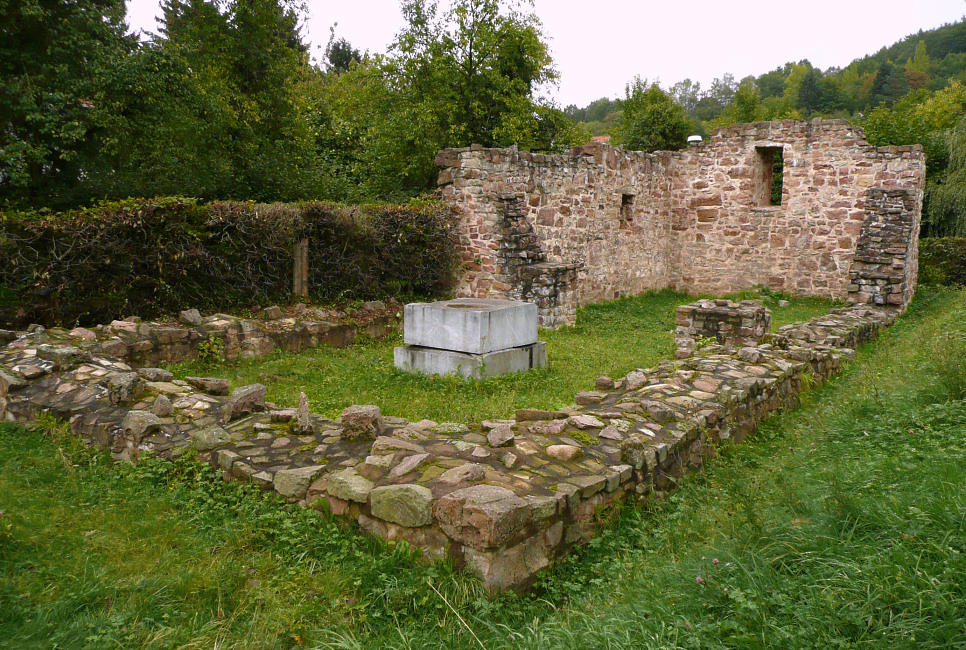 Laurentiuskirchenruine Münden